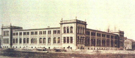 Die Thüringische Glasinstrumentenfabrik Alt, Eberhard & Jäger um 1900